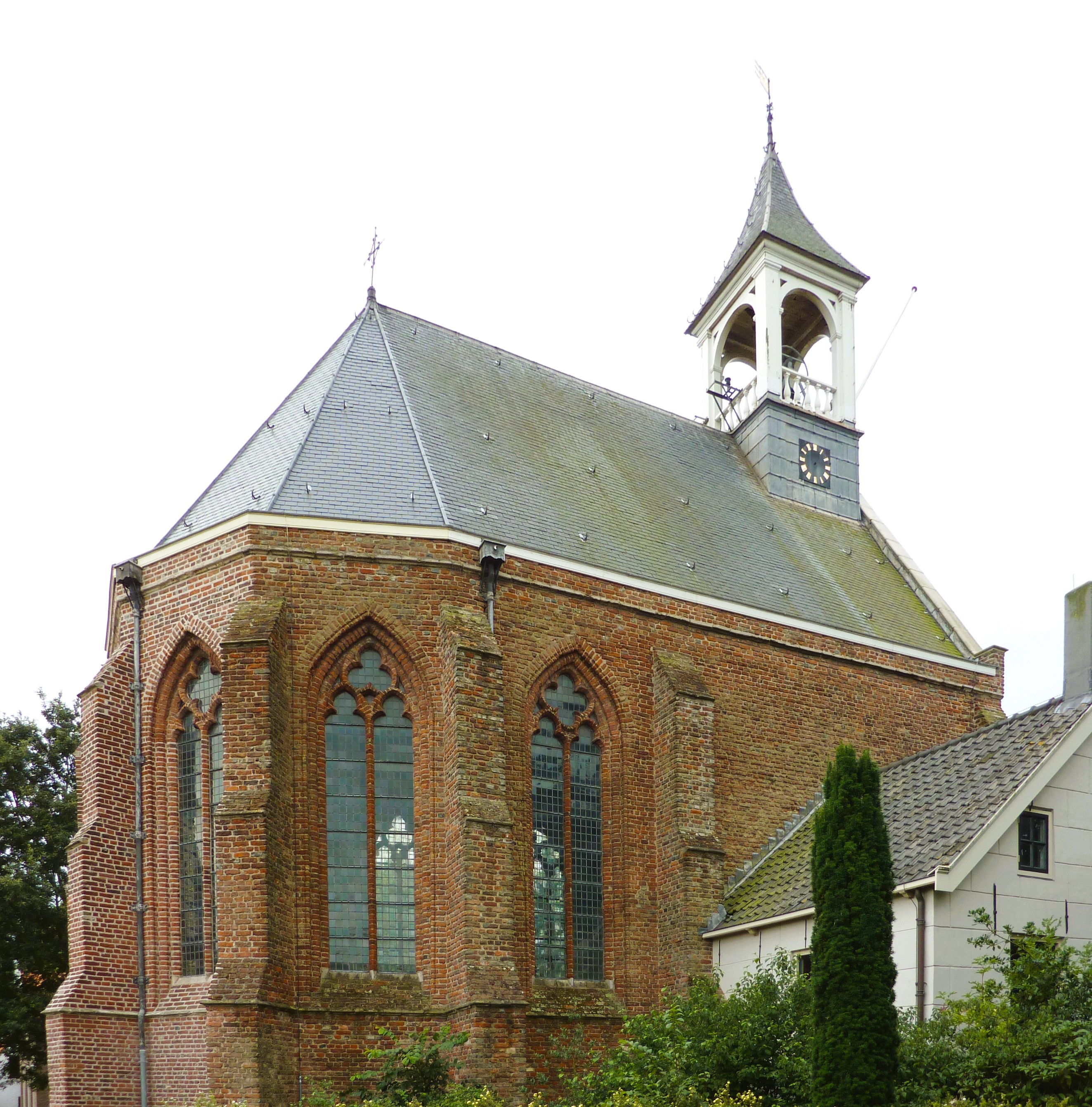 St. Joriskerk (Hoedekenskerke)